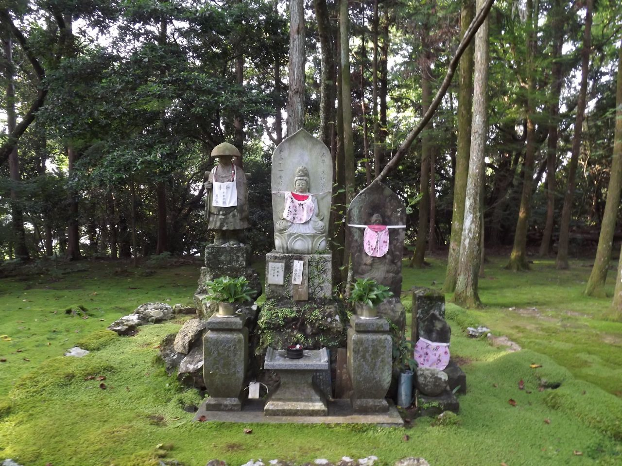 五台山八十八ヵ所の31番